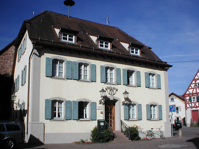 Barockes Rathaus von Neidenstein, erbaut 1773